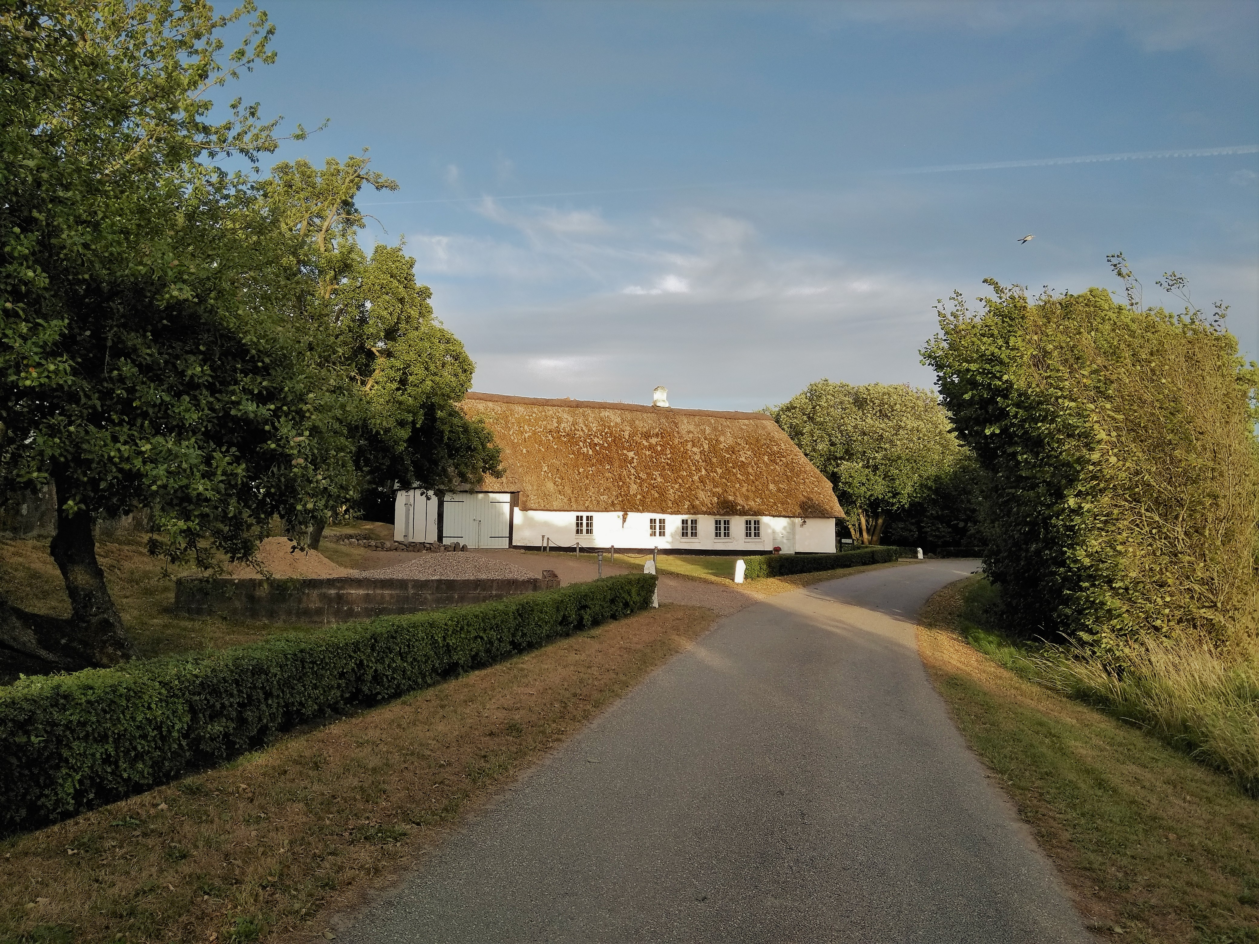 Vaade loodest "kuningateele" ja vanale pastoraadile.